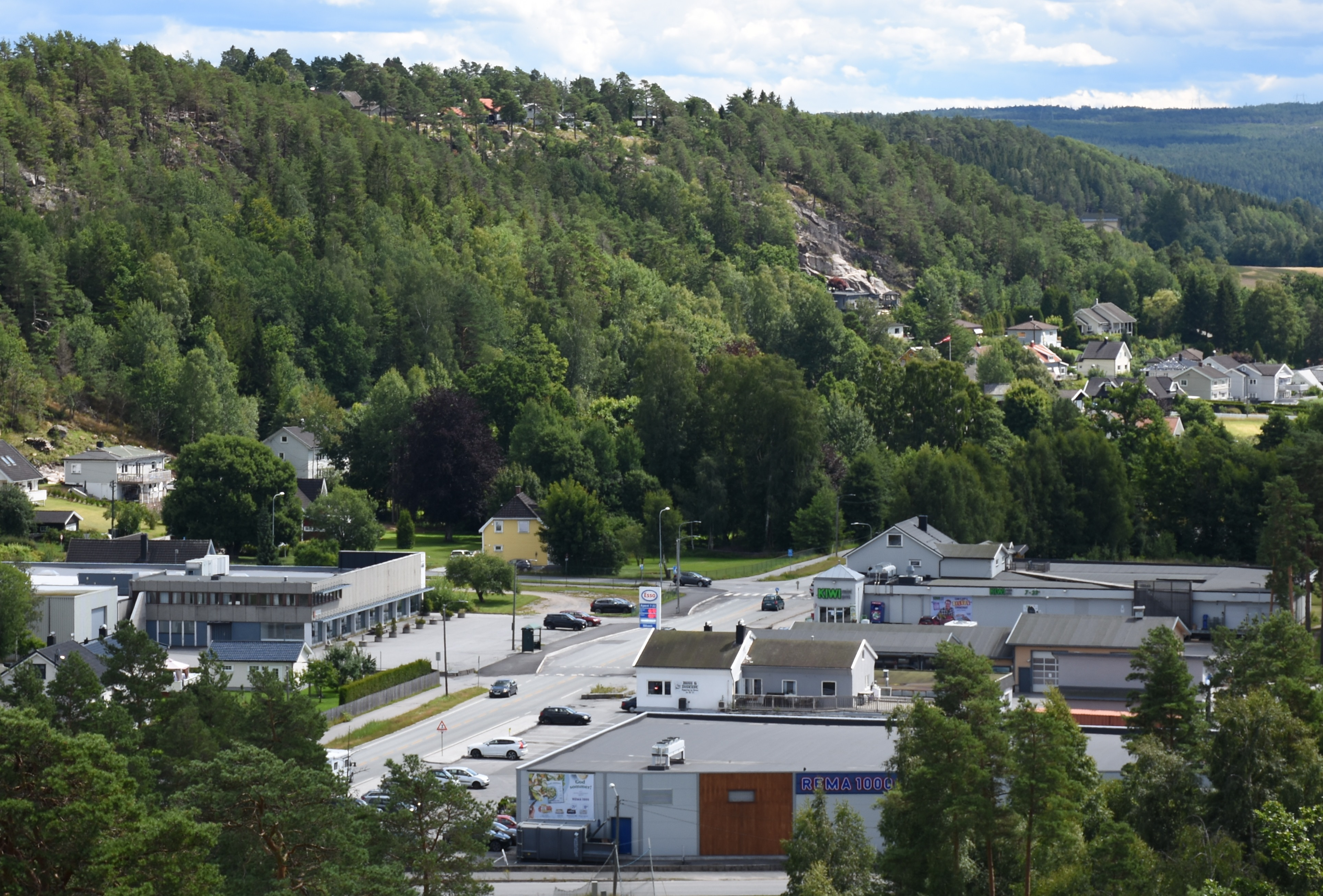 Iddeveien (fylkesvei 220) sett fra Fredriksten festning